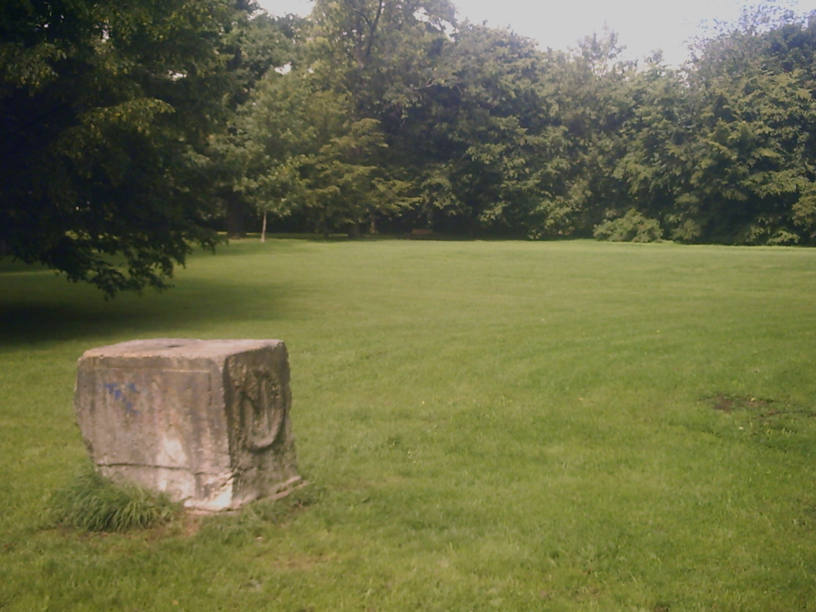 Geutebrück Denkmal heutiger Zustand ohne Sphinx